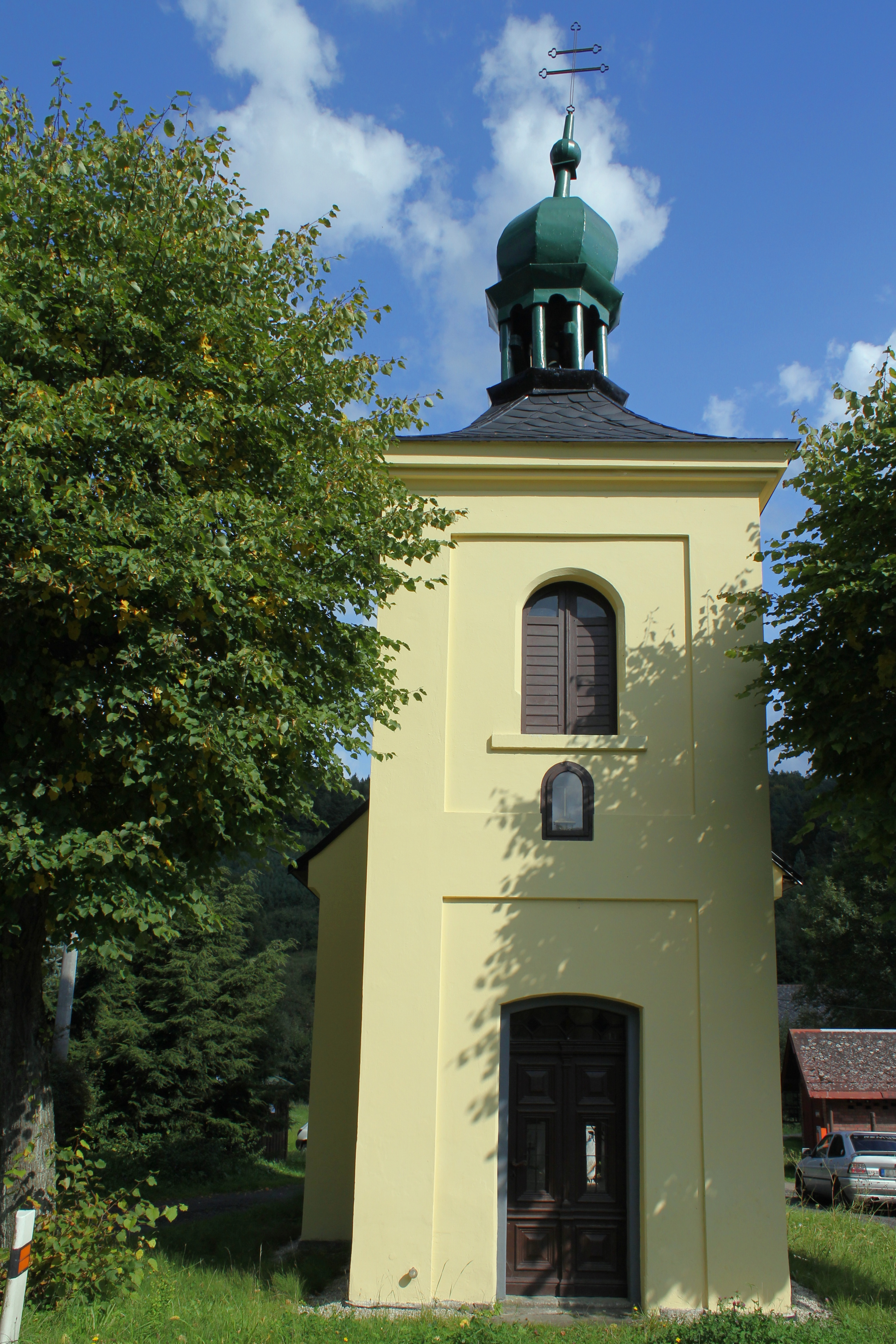 Kaple, Bohumileč (Český Dub)